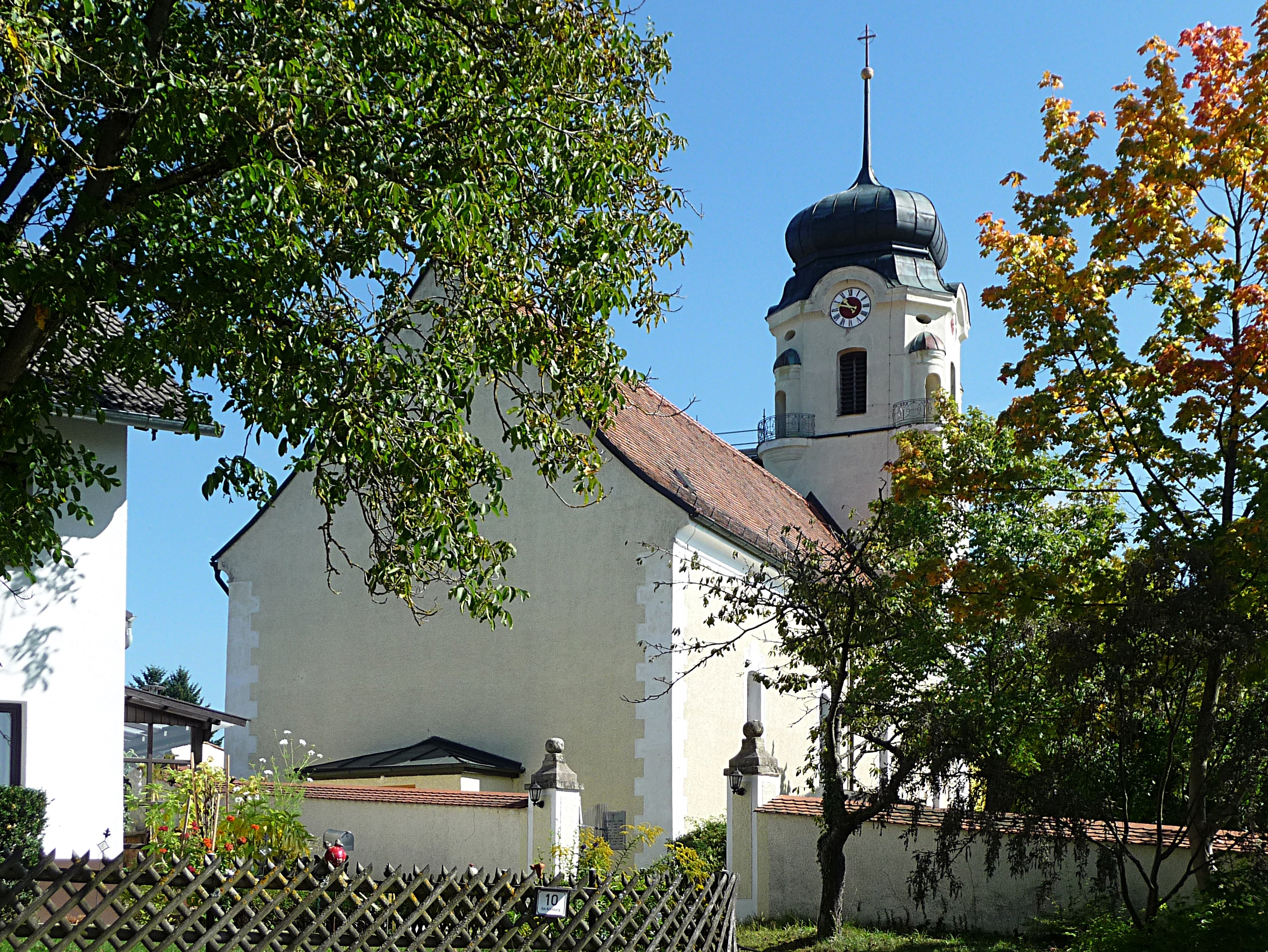 Die Pfarrkirche St. Nikolaus in Garham